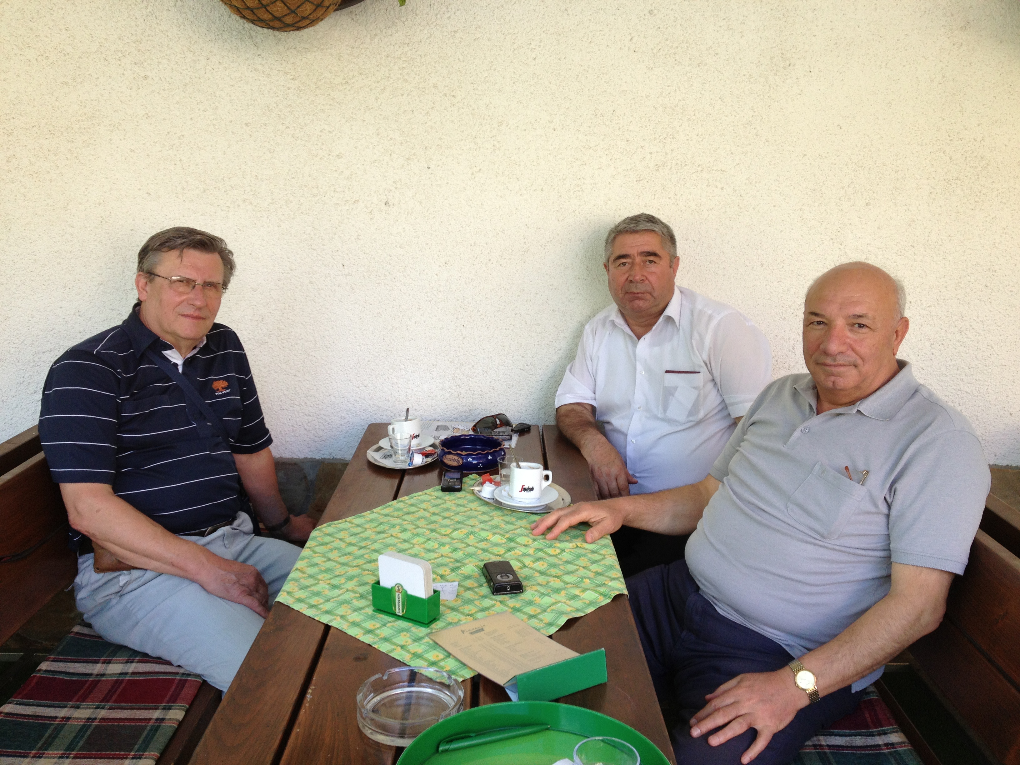 Çexiyalı professor İvan Meznik, professor Azər Kərimov və Zakir Kərimov Çexiyada olarkən